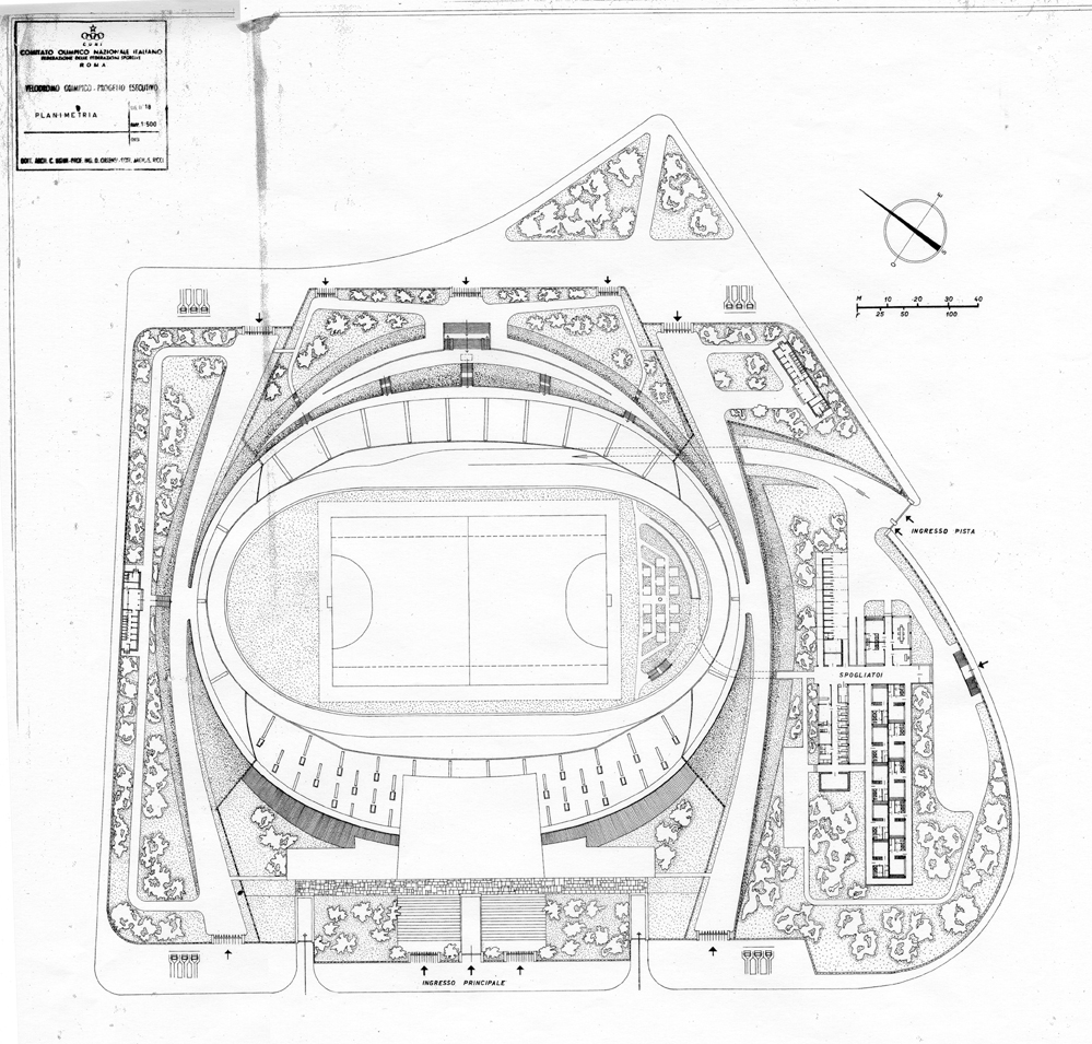 disegno